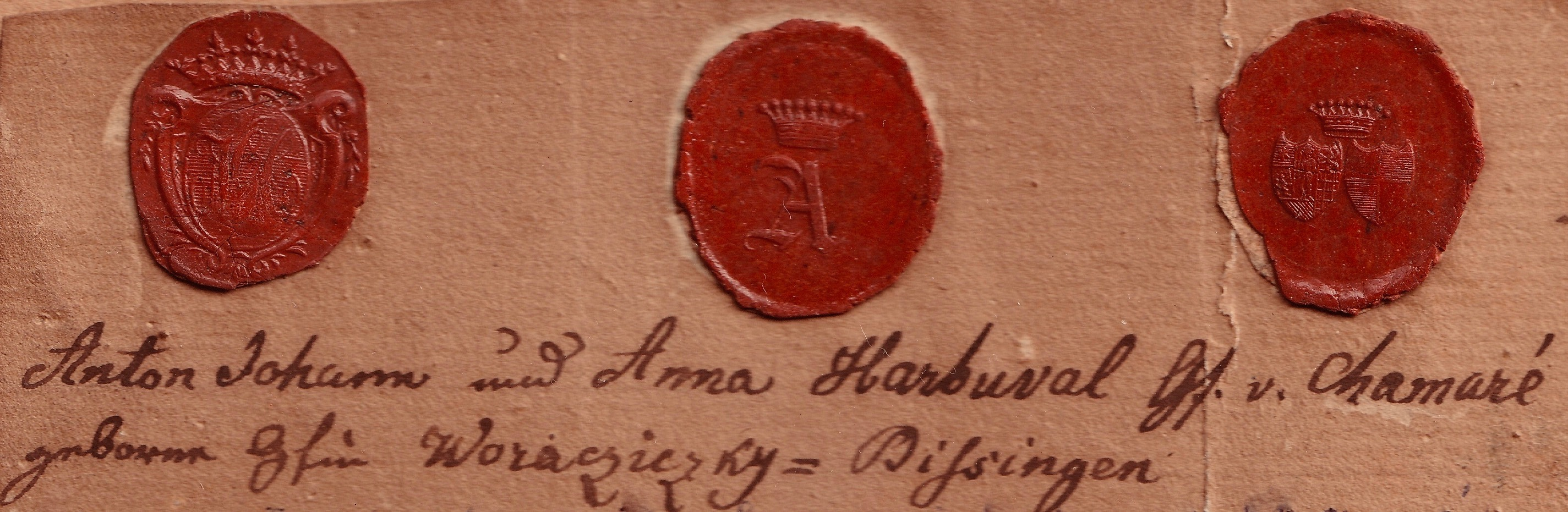 Pečetě Jan Antonín Harbuval a Anna Woraczizky. Jan Antonín Harbuval- Chamaré, (1737-1808) Nové hrady zámek Potštejn